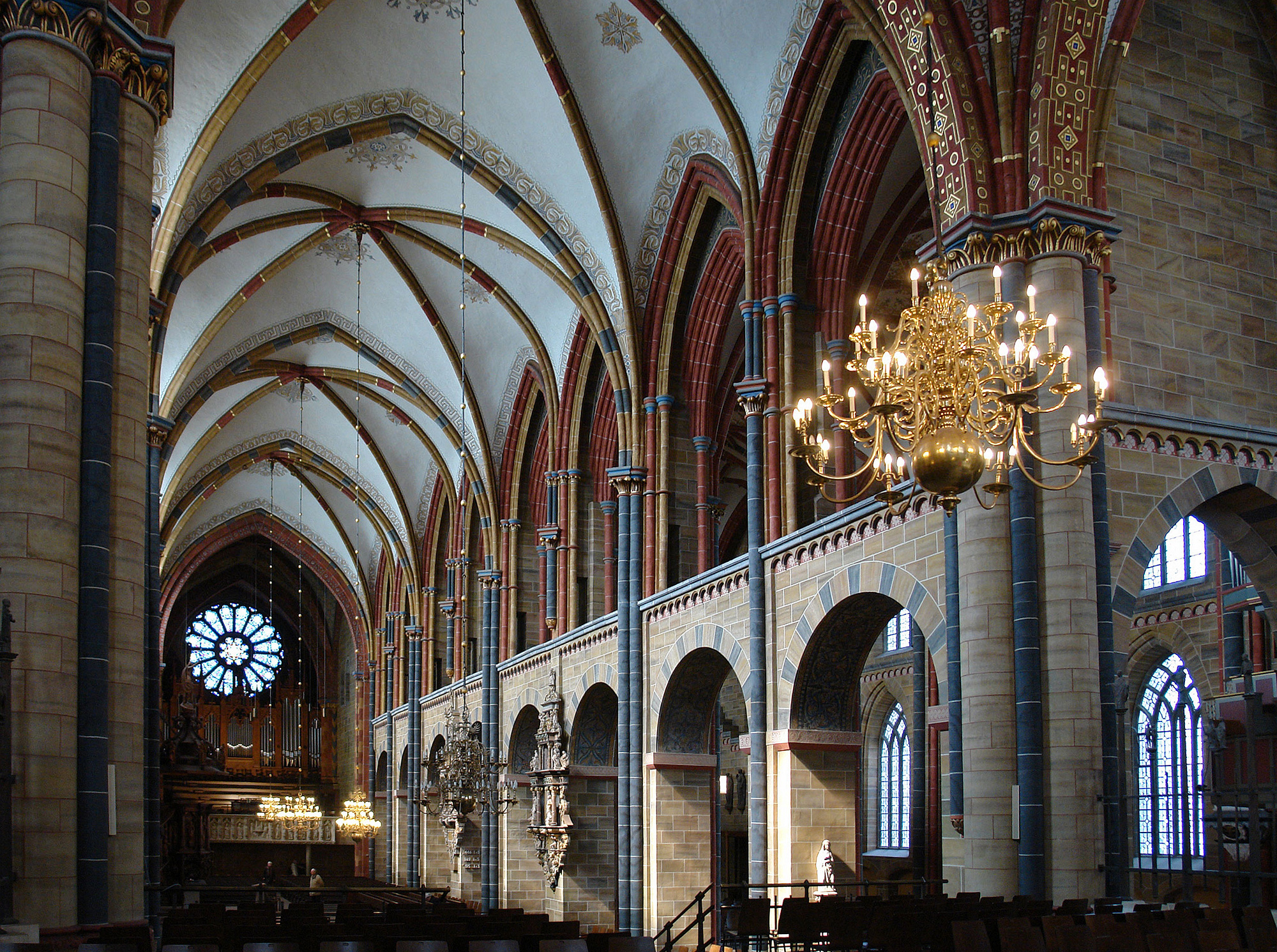 St. Petri Dom in Bremen. Blick vom Chor zur Orgel